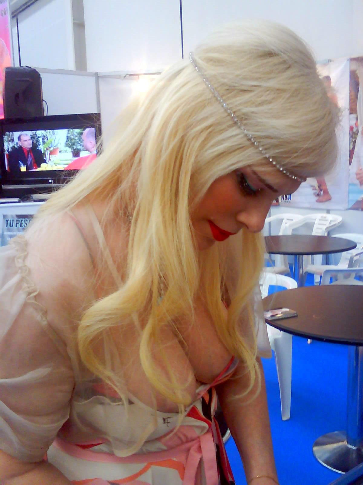 O Salón Erótico "Eros Galicia" celebrouse en Coruña na primeira fin de semana de xuño de 2009